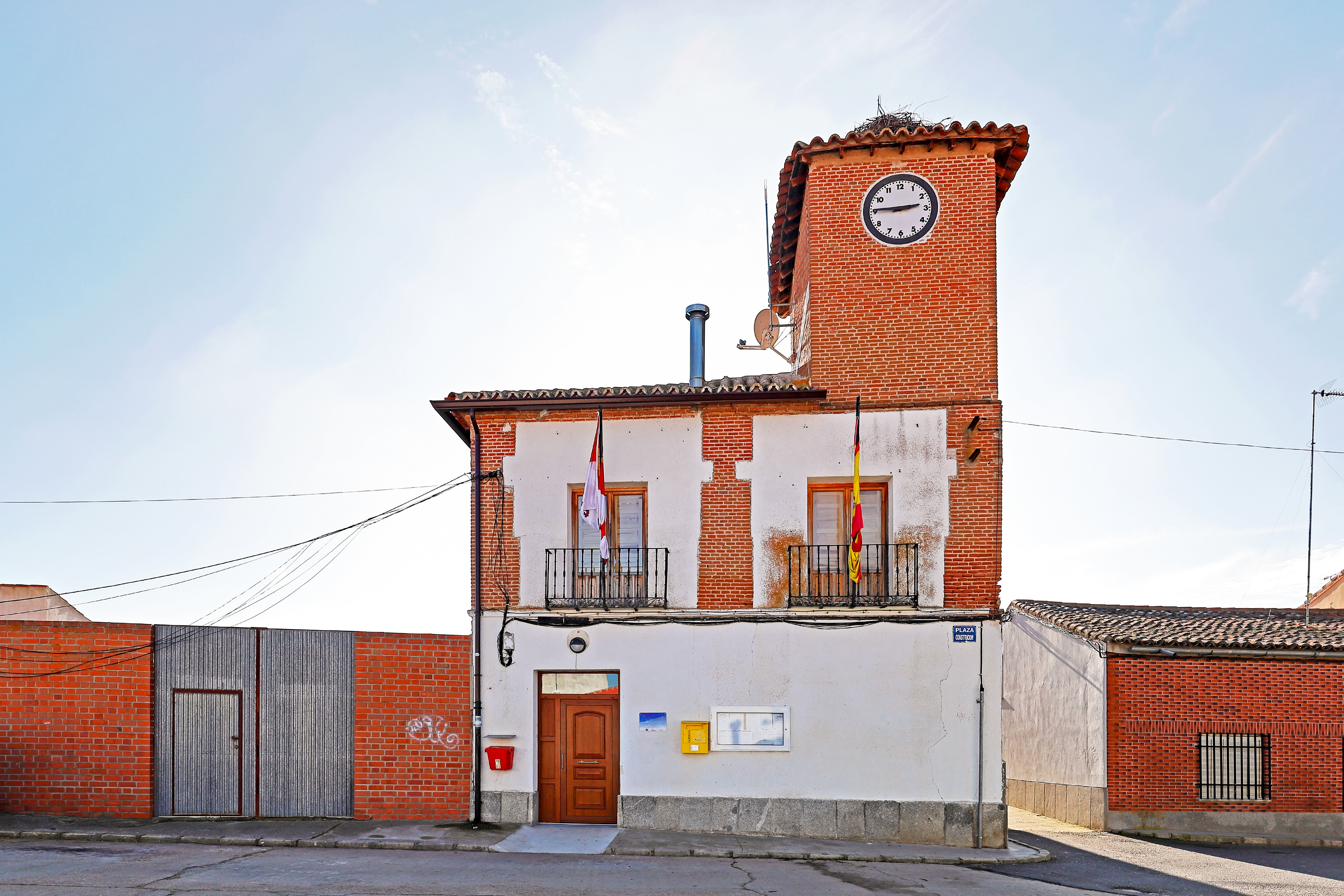 Rasueros es un municipio que pertenece a la comarca de La Moraña, provincia de Ávila.